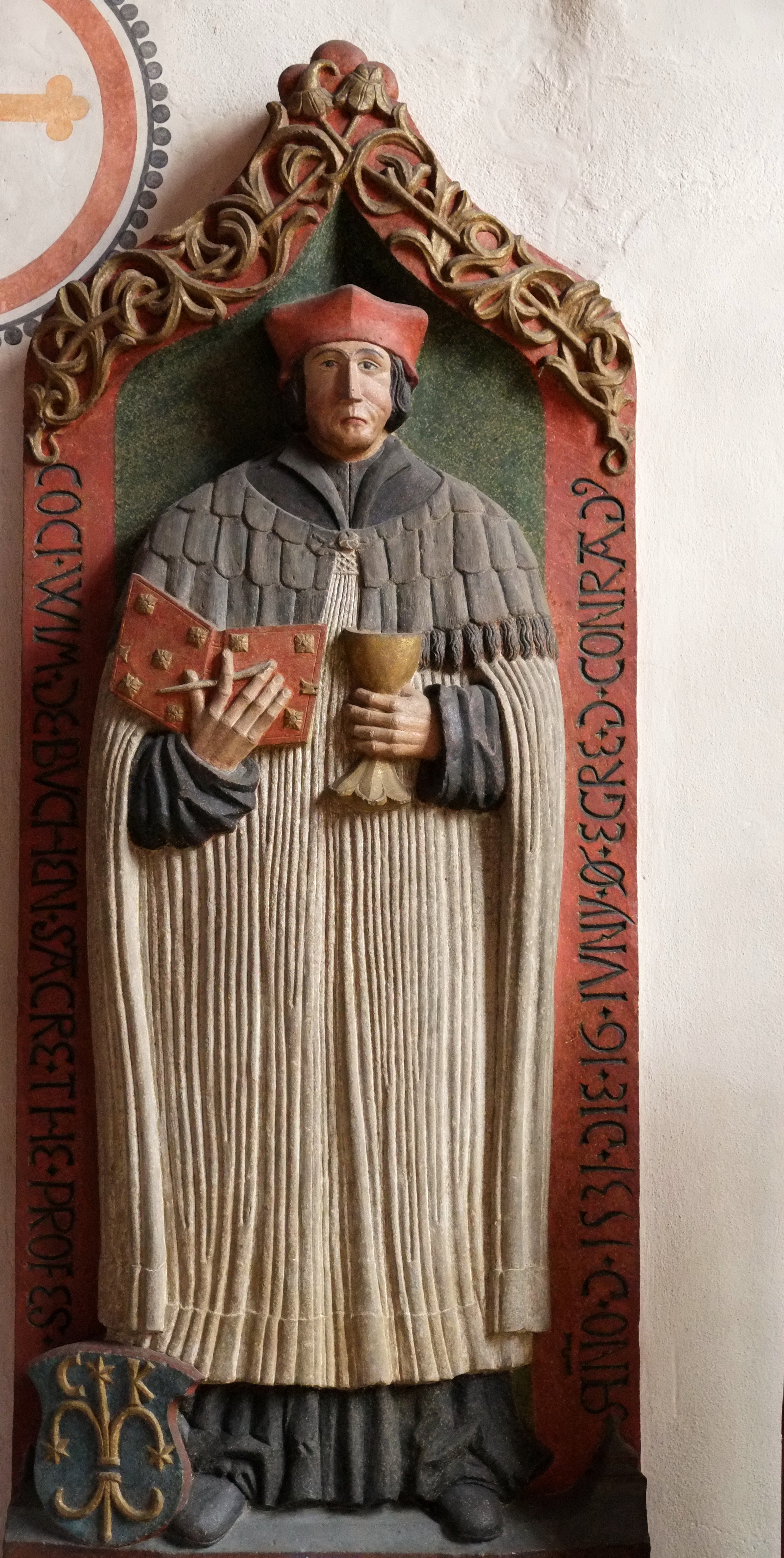 Kirche St. Oswald in Buchen (Odenwald) im Neckar-Odenwald-Kreis (Baden-Württemberg, Deutschland), Epitaph für Konrad Wimpina